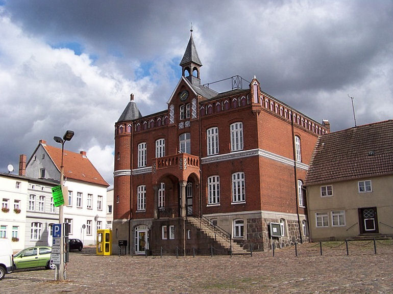 Rathaus Laage